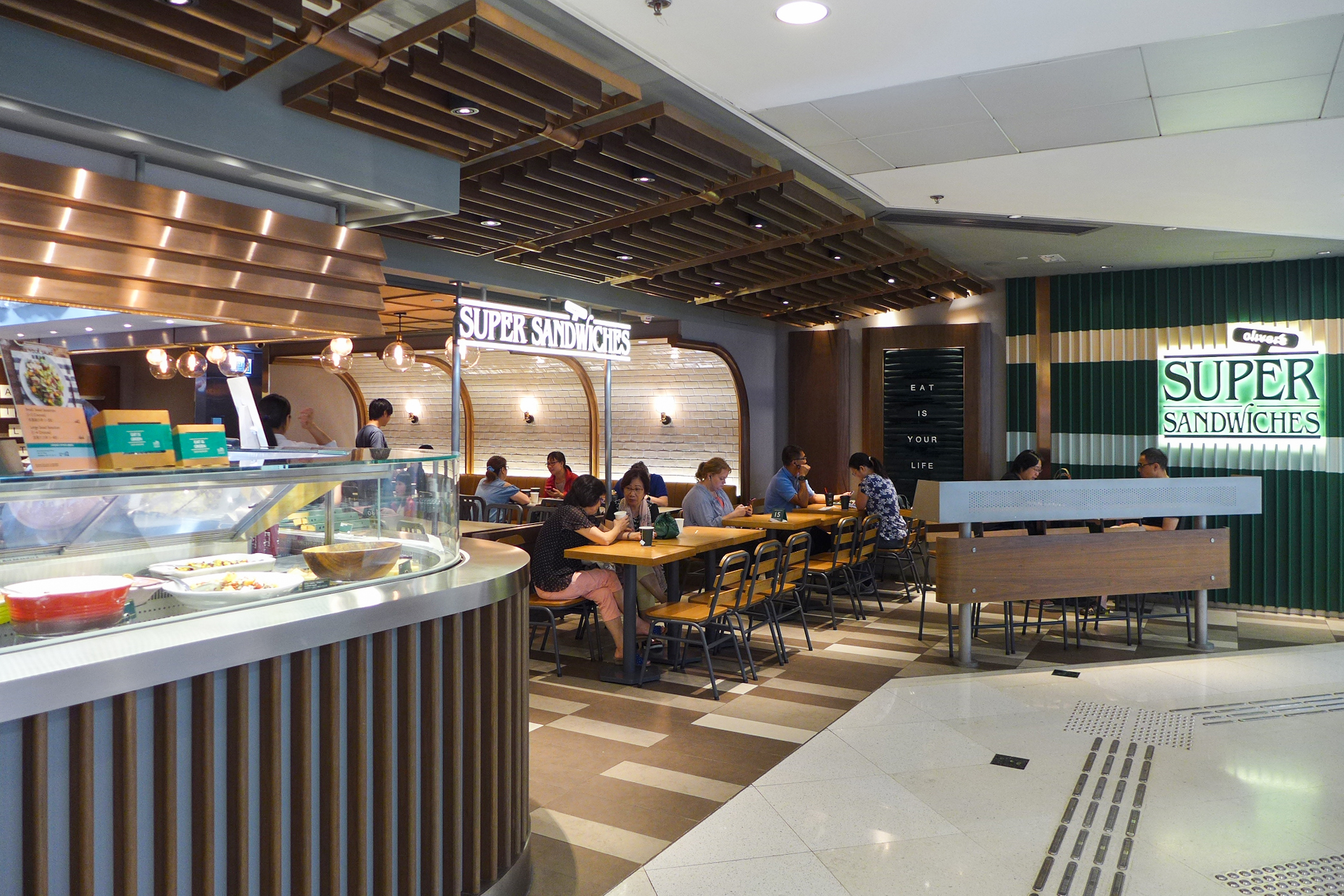 Telford Plaza Oliver Super Sandwiches